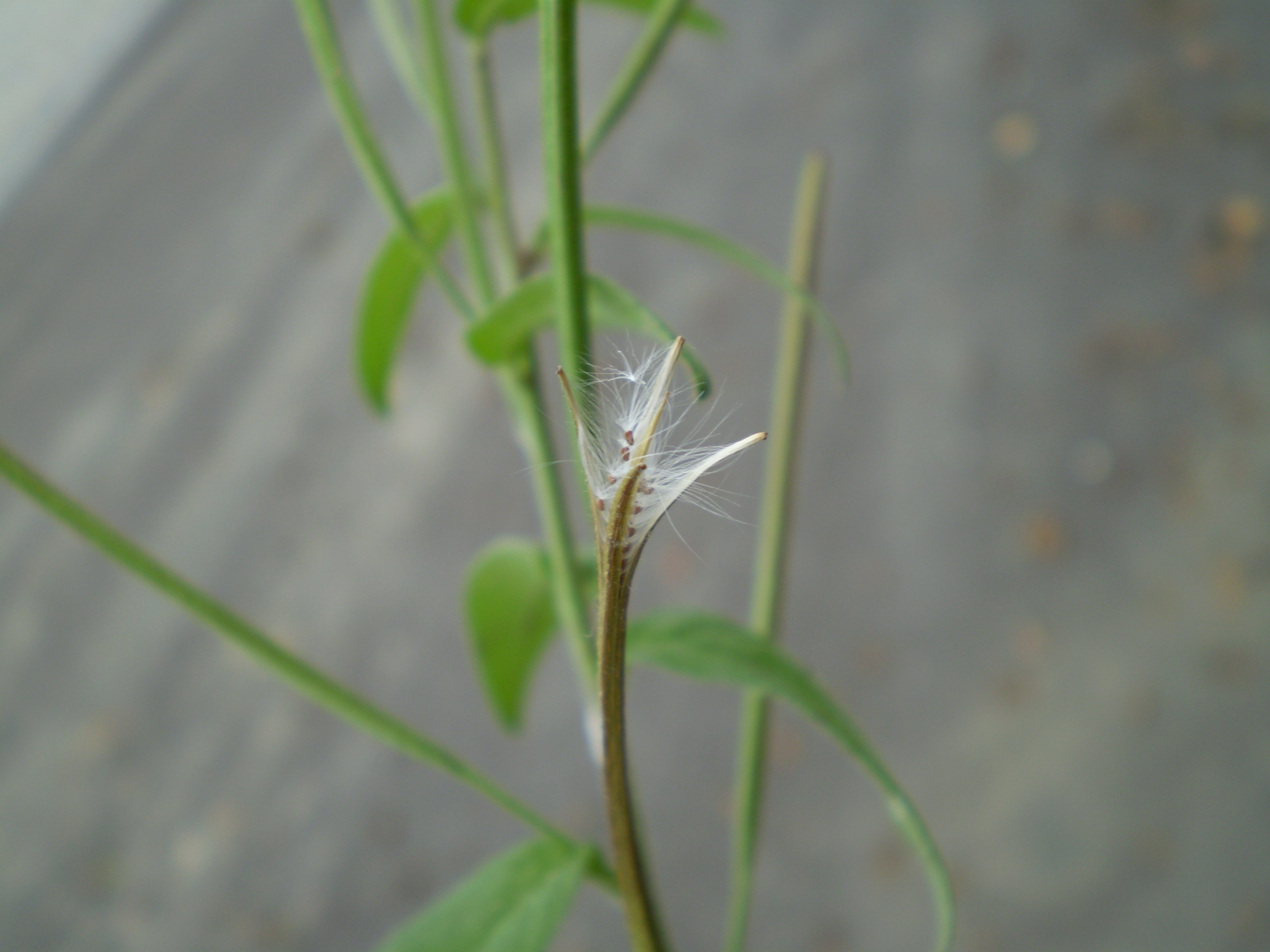 Epilobium parviflorum viltige basterdwederik